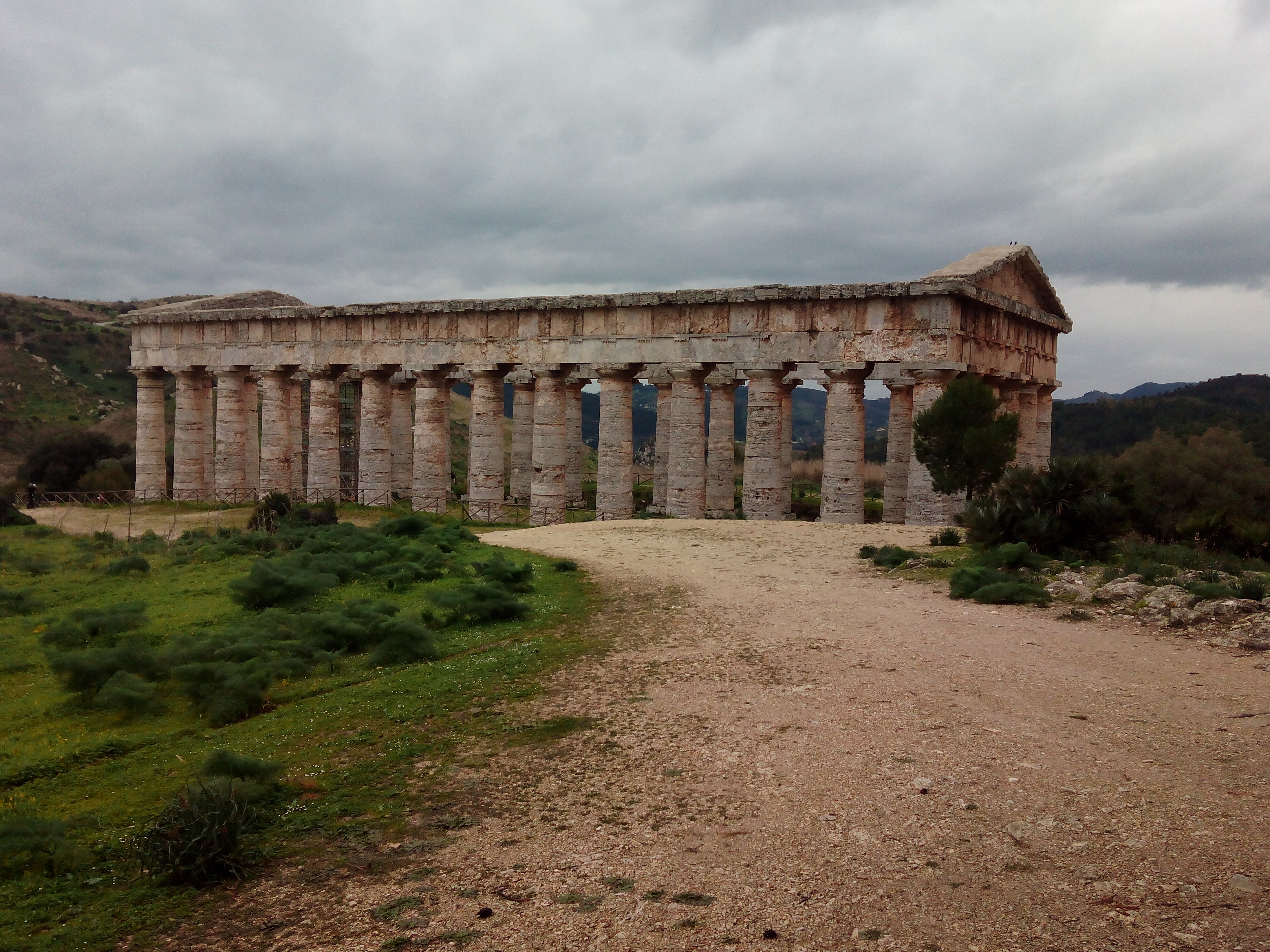 Segestako doriar tenpluaren alboa